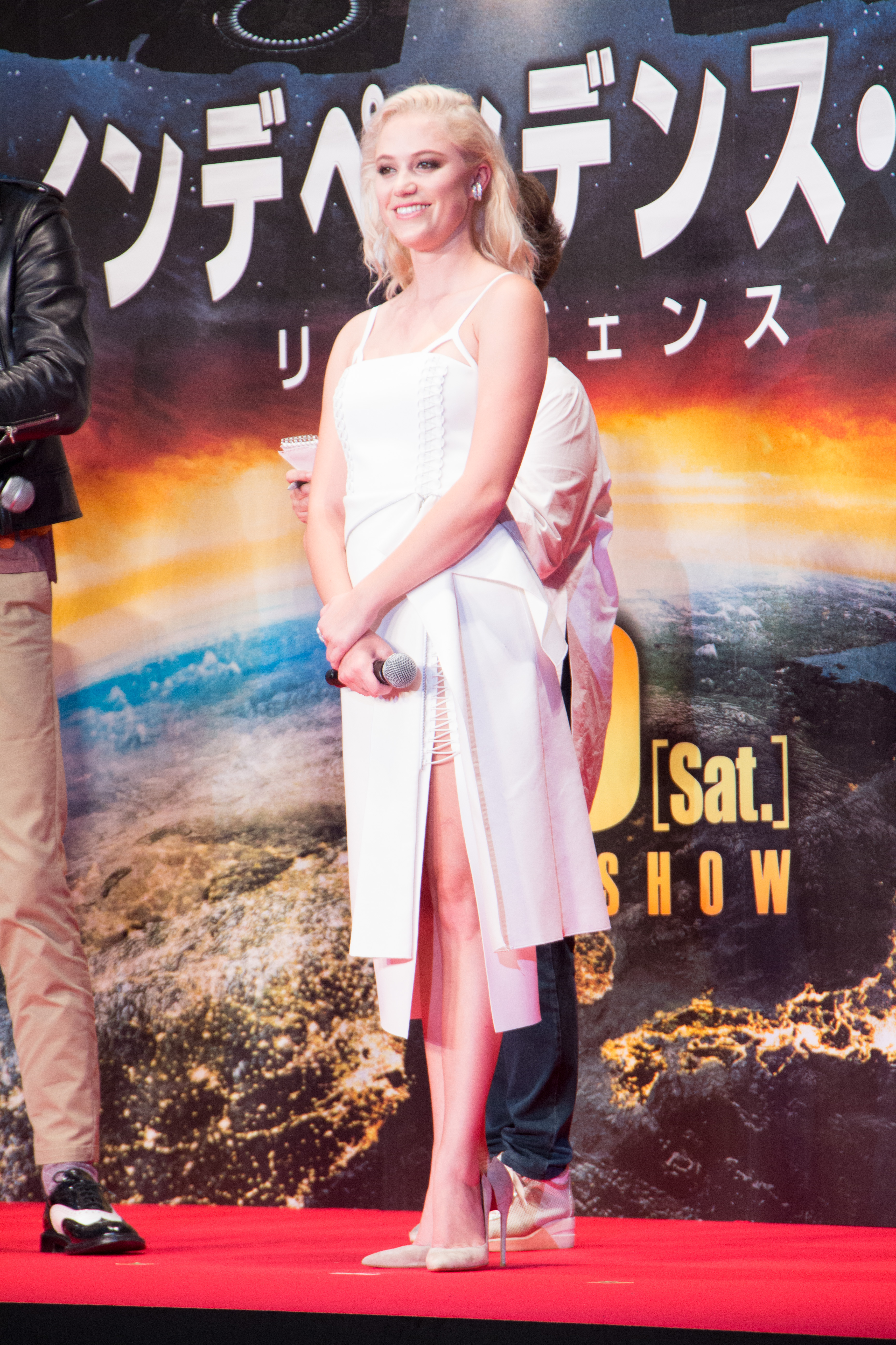 インデペンデンス・デイ: リサージェンス ジャパンプレミア マイカ・モンロー